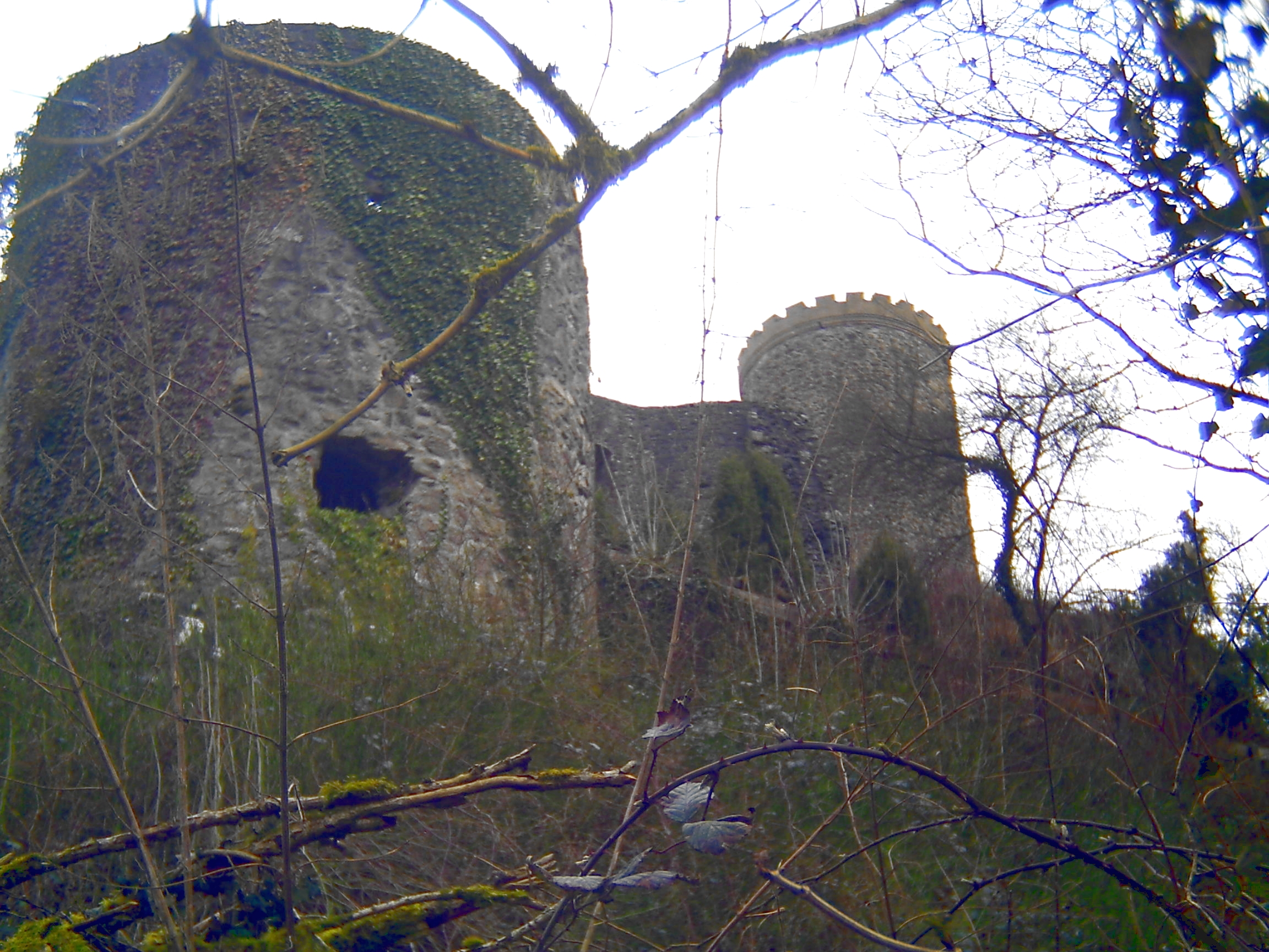 Burg Husen (Hausach)